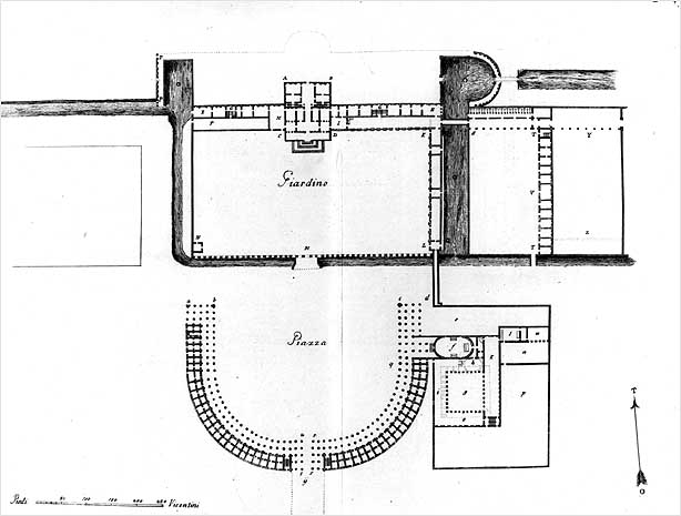 Villa Contarini a Piazzola sul Brenta (Padova). Disegno da Francesco Muttoni, 1760 Pianta del complesso